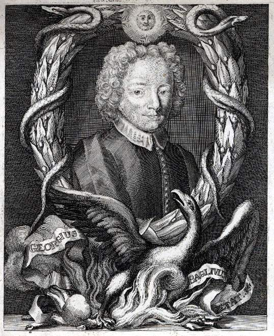 Giorgio Baglivi (1668-1707)